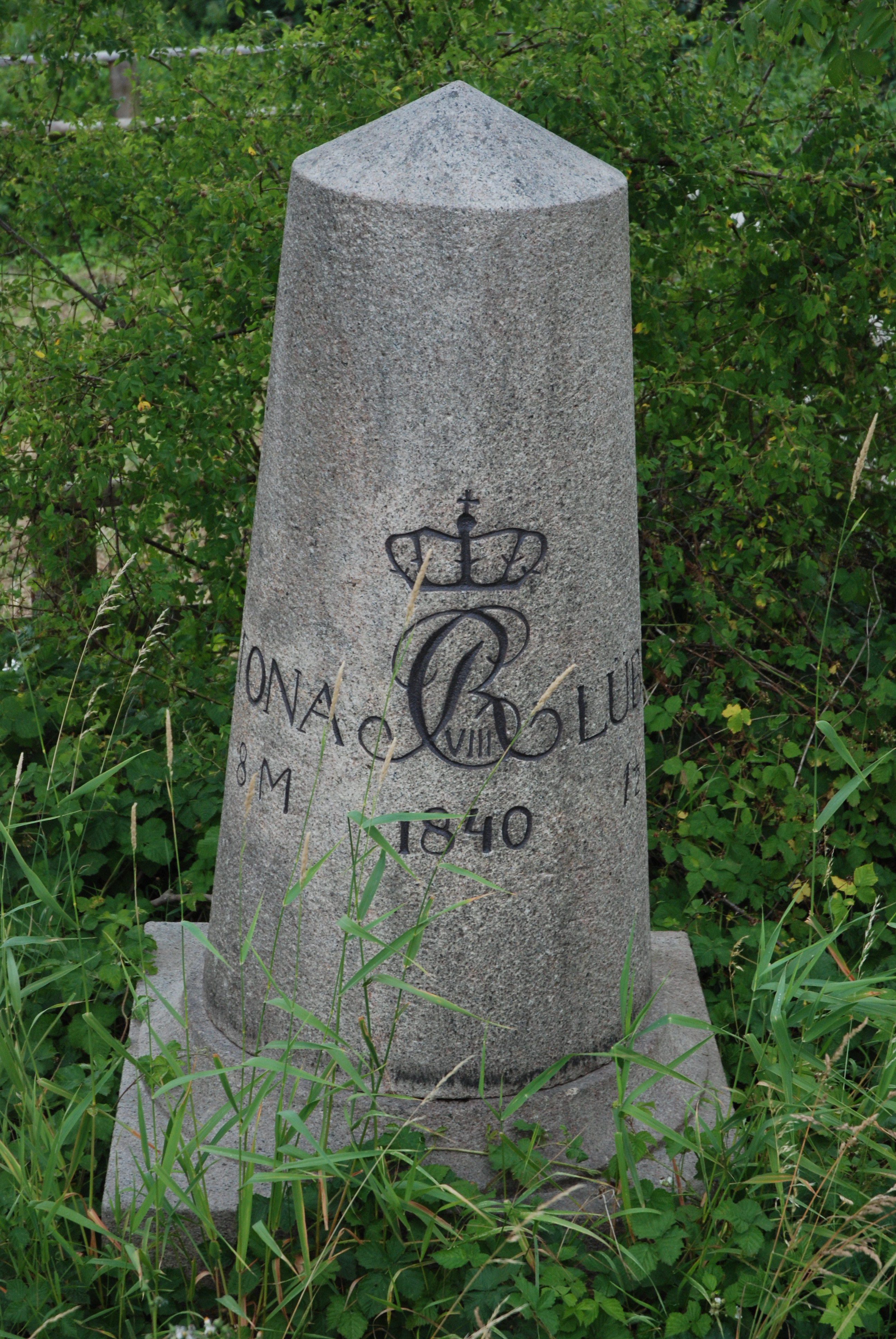 Vollmeilenstein an der Altona-Lübecker Chaussee. Entfernung nach Altona 8 Meilen, Lübeck 1 1/2 Meilen